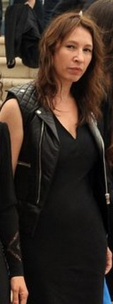 Emmanuelle Bercot lors de la présentation du film "Polisse" au festival de Cannes